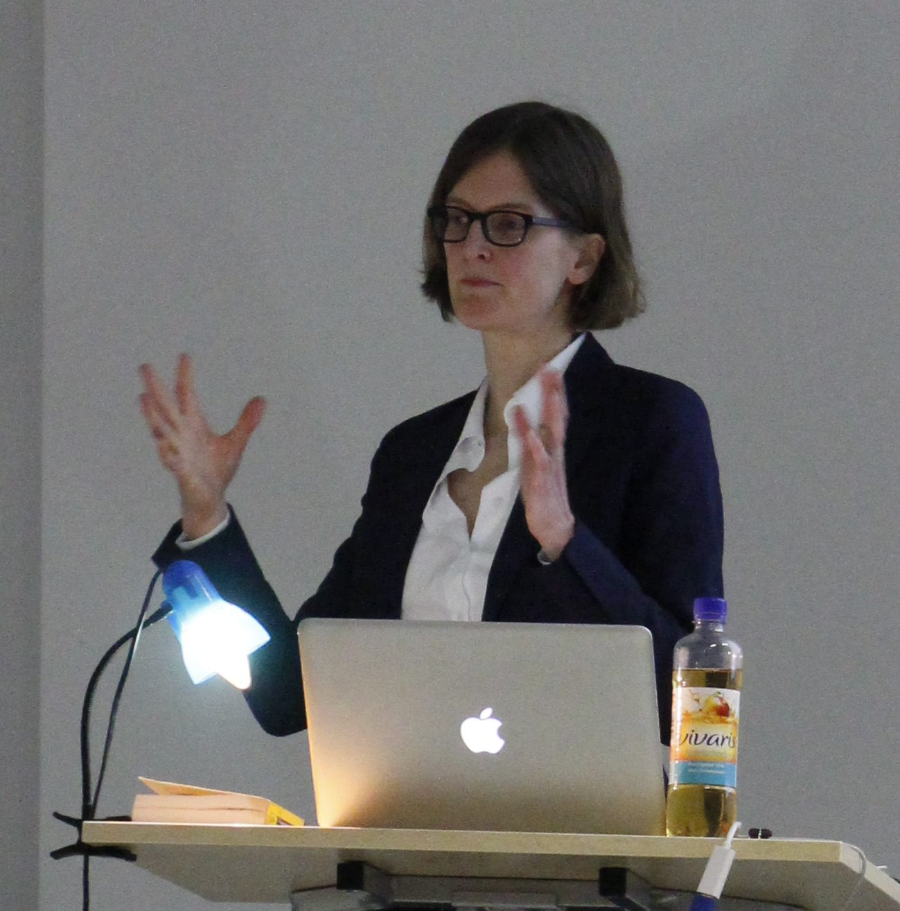 Monsters of Law am 20.2.2014 mit Prof. Dr. Katharina de la Durantaye